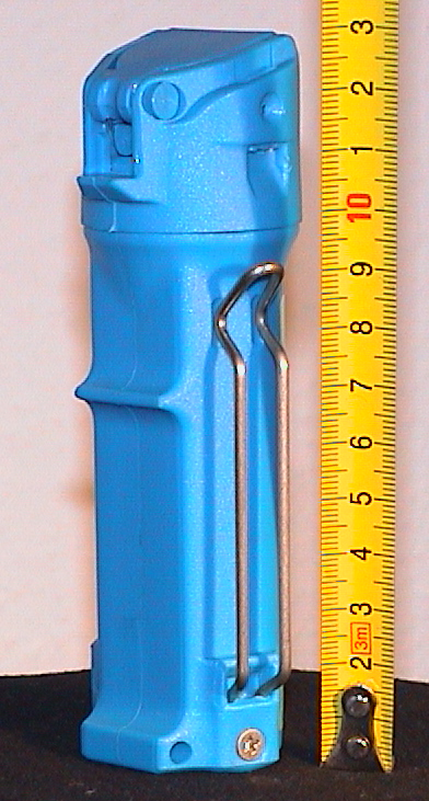 First Defense Inert Spray MK6